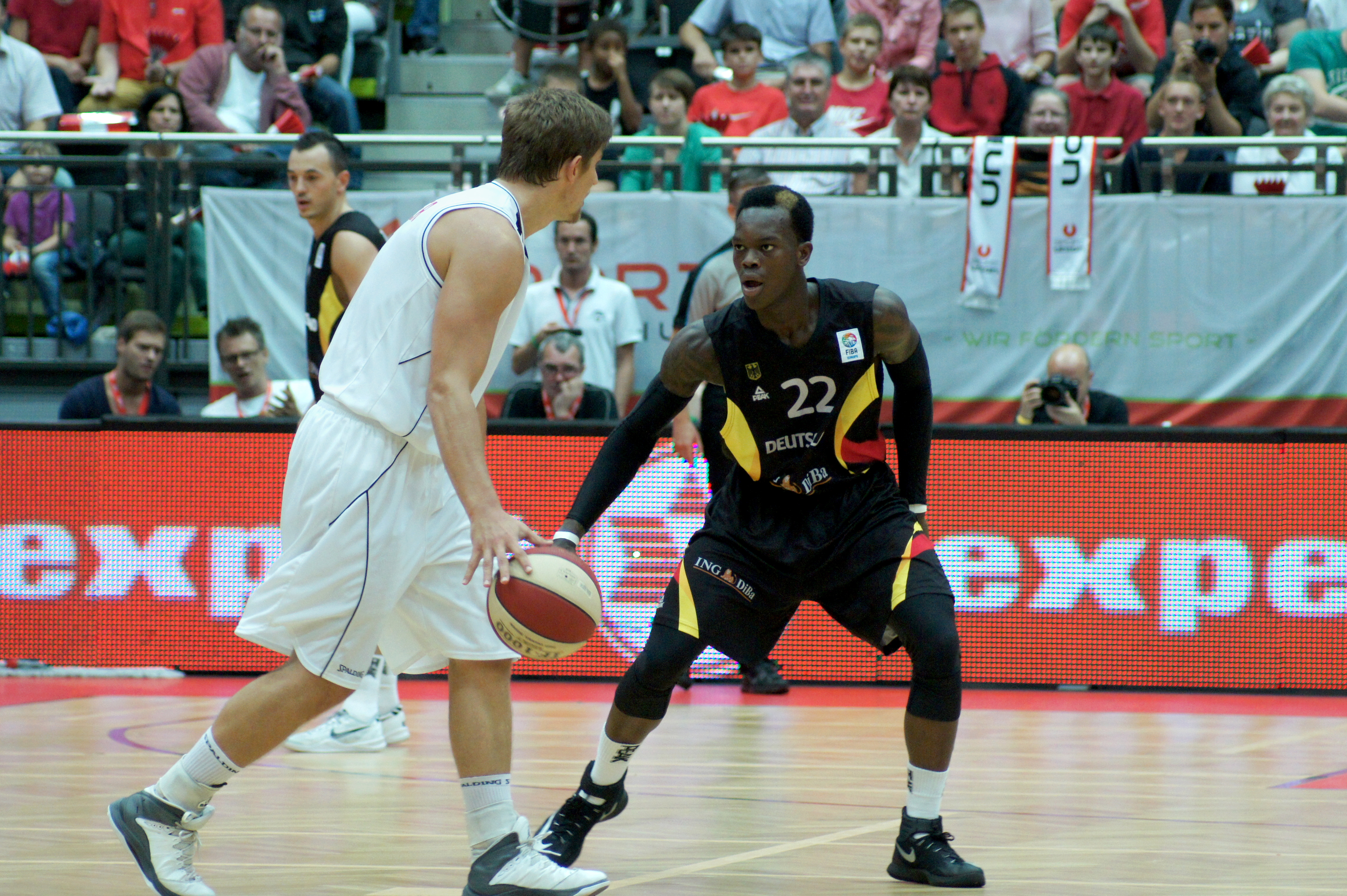 Qualifikationsspiel EuroBasket Österreich - Deutschland, 13. August 2014 im Multiversum Schwechat.